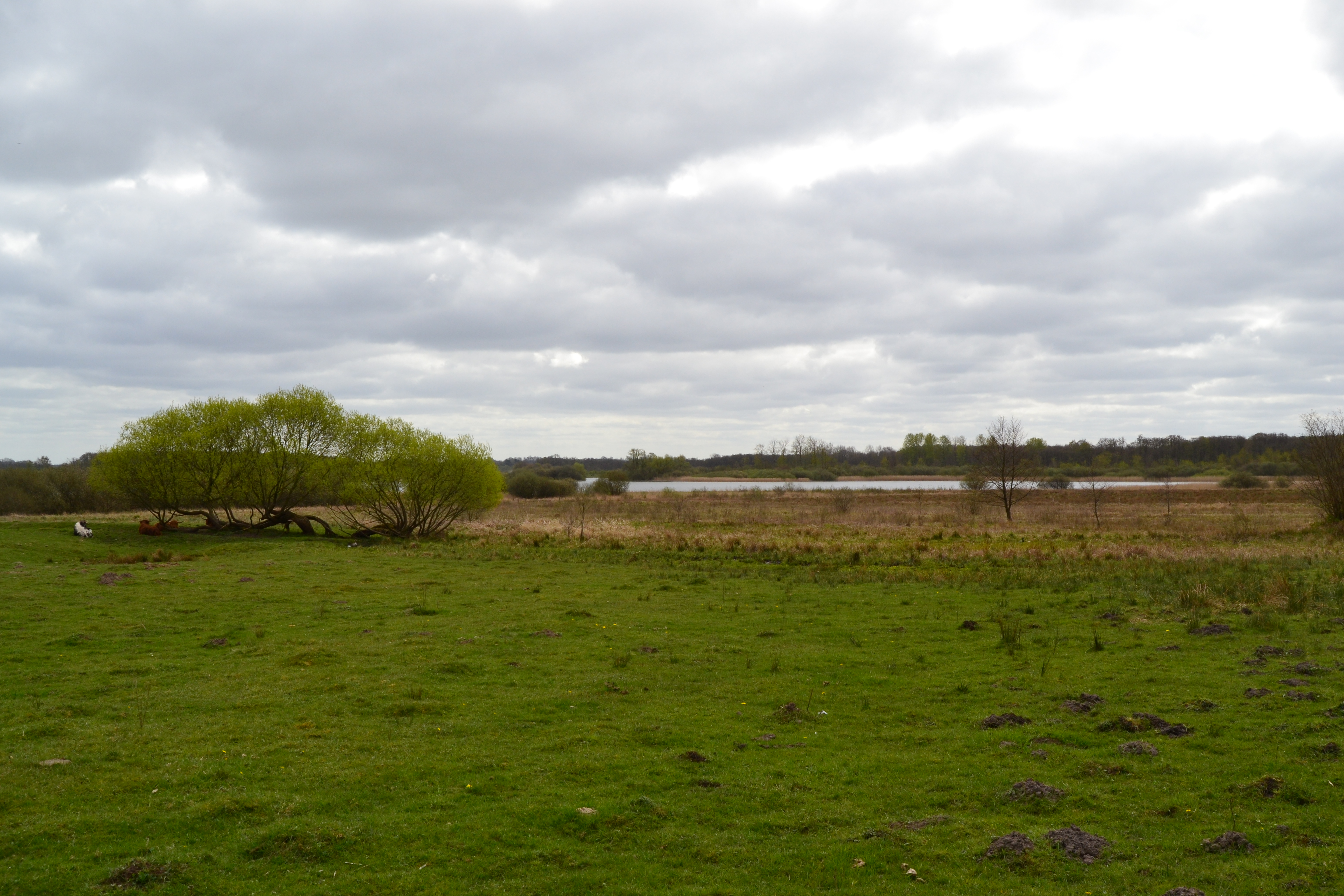 Nordteil des Naturschutzgebietes Halbinseln und Buchten im Lanker See